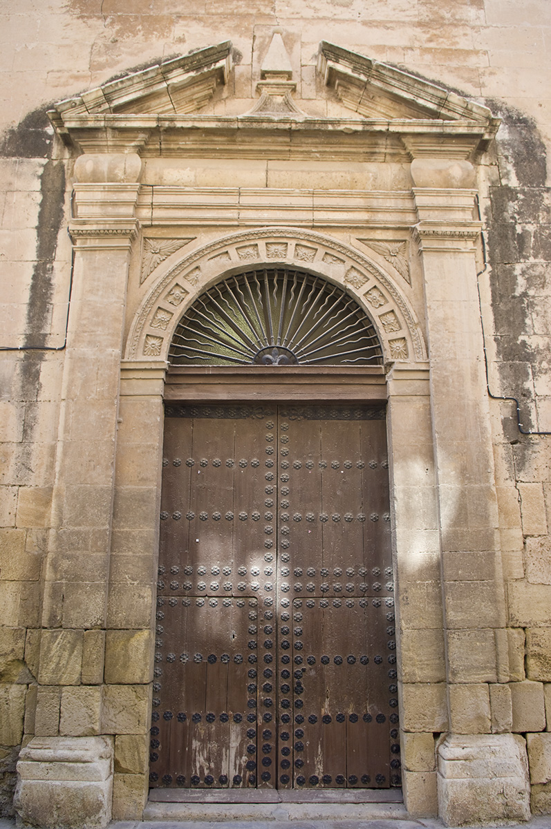 Portada del lado de la Epístola de San Patricio en Lorca (Murcia)